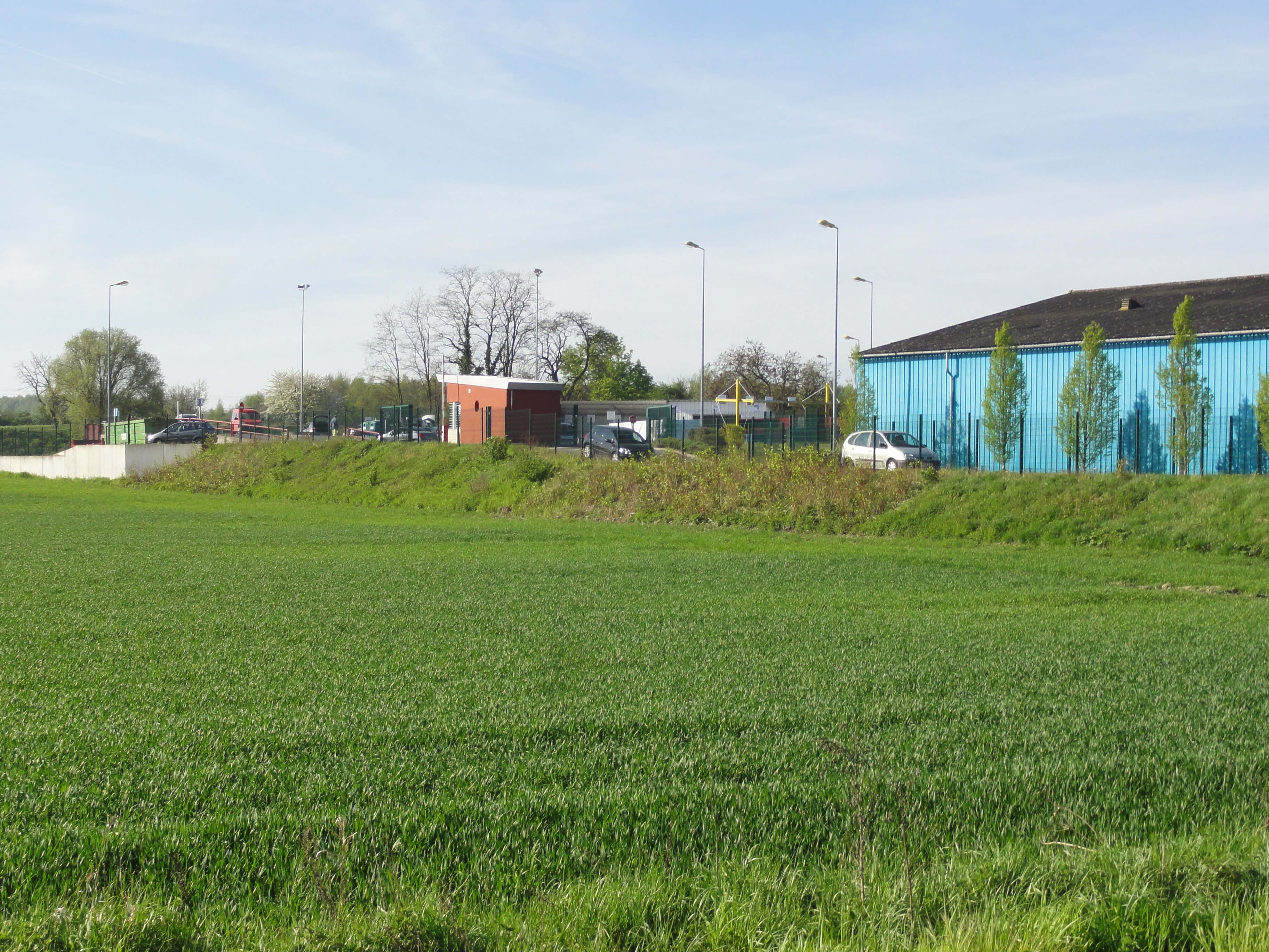 Terril n° 132 dit d'Aoust, Fosse Aoust de la Compagnie des mines d'Aniche, Aniche, Nord, Nord-Pas-de-Calais, France.